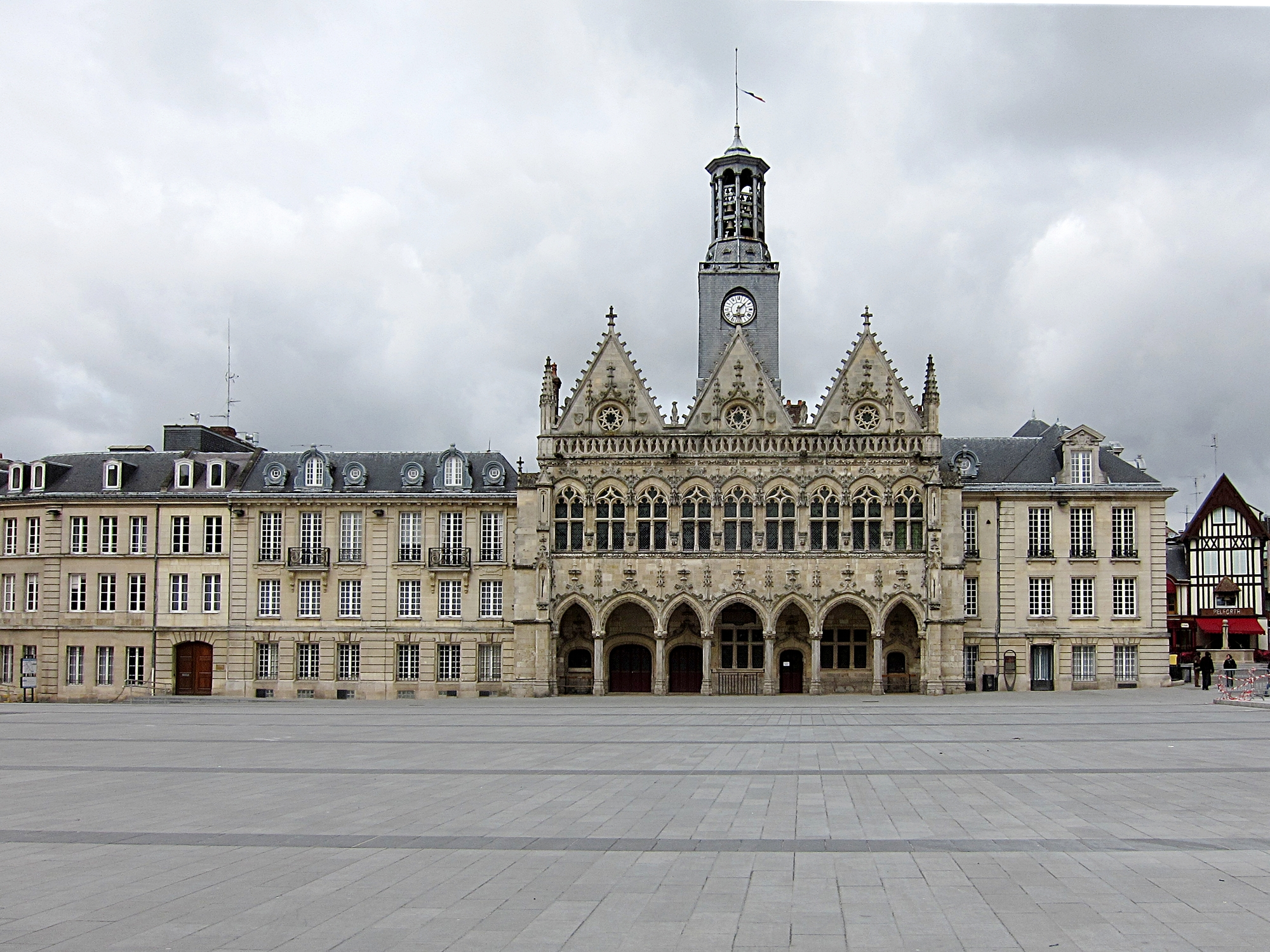 L'hôtel de ville de Saint-Quentin (Aisne).